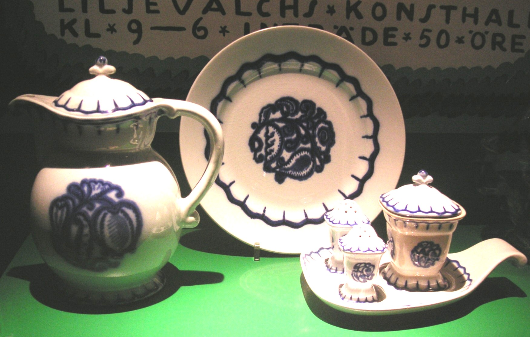 Porslin "Liljeblå" av Wilhelm Kåge till Hemutställningen 1917, utställd på Nationalmuseum Stockholm